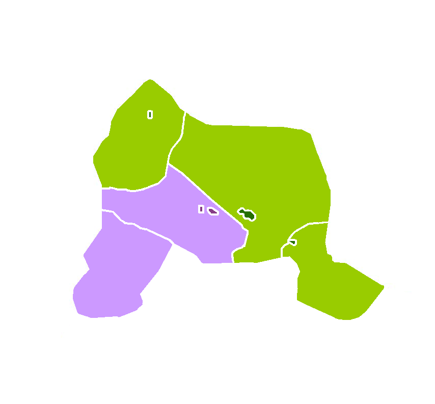 نقشه گنگ شهرستان آباده